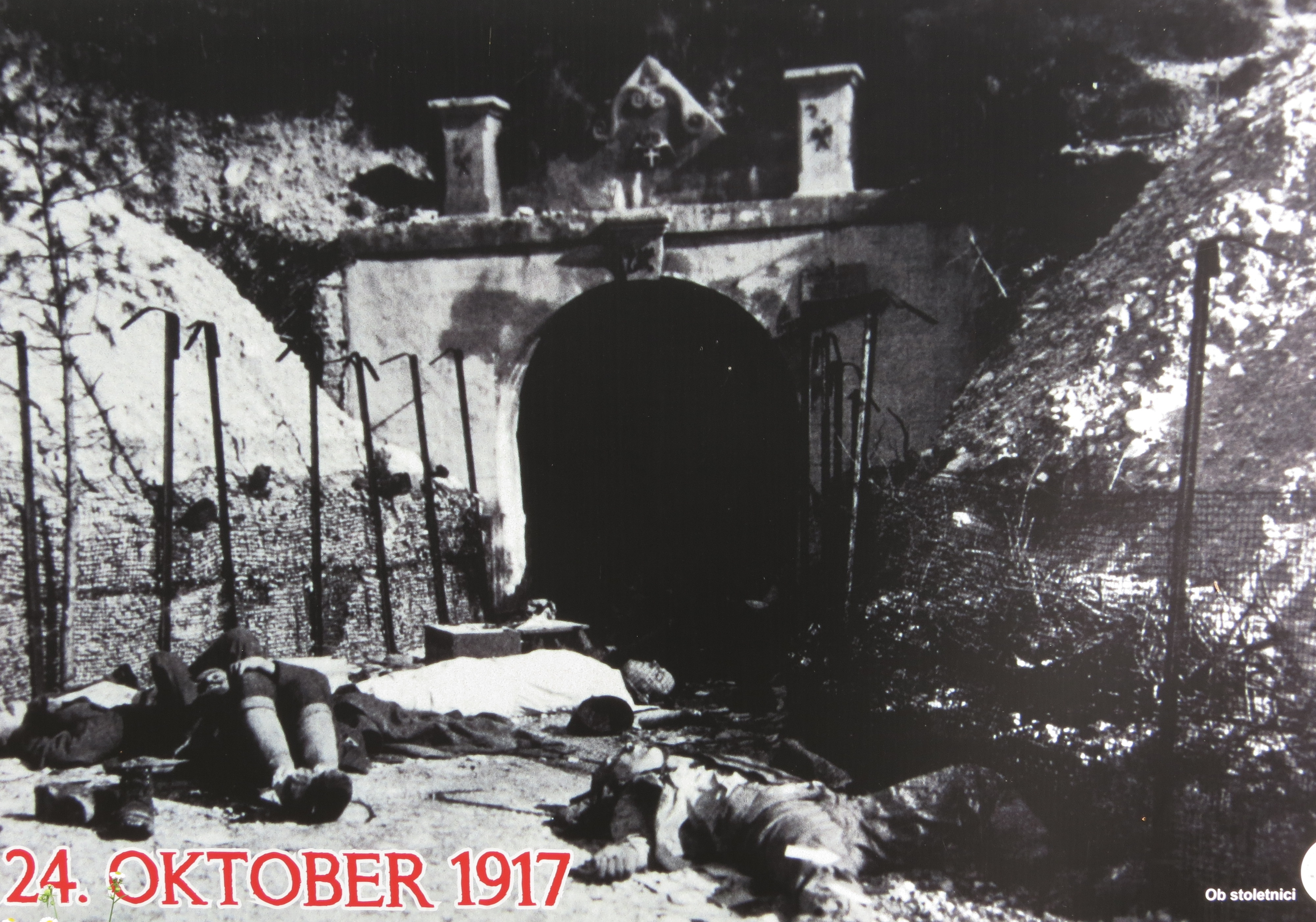 24 октября 19917